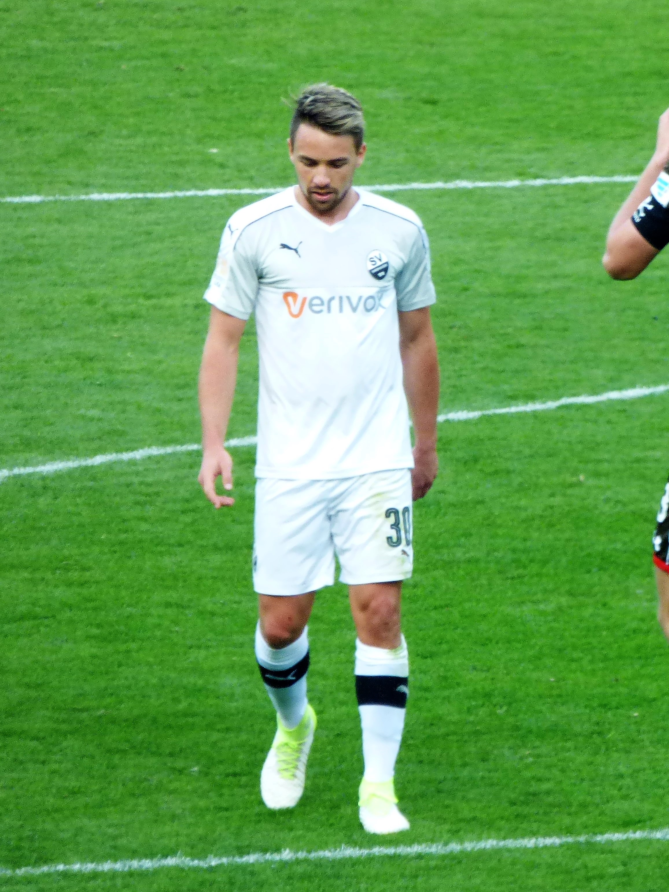 Thomas Pledl 2017